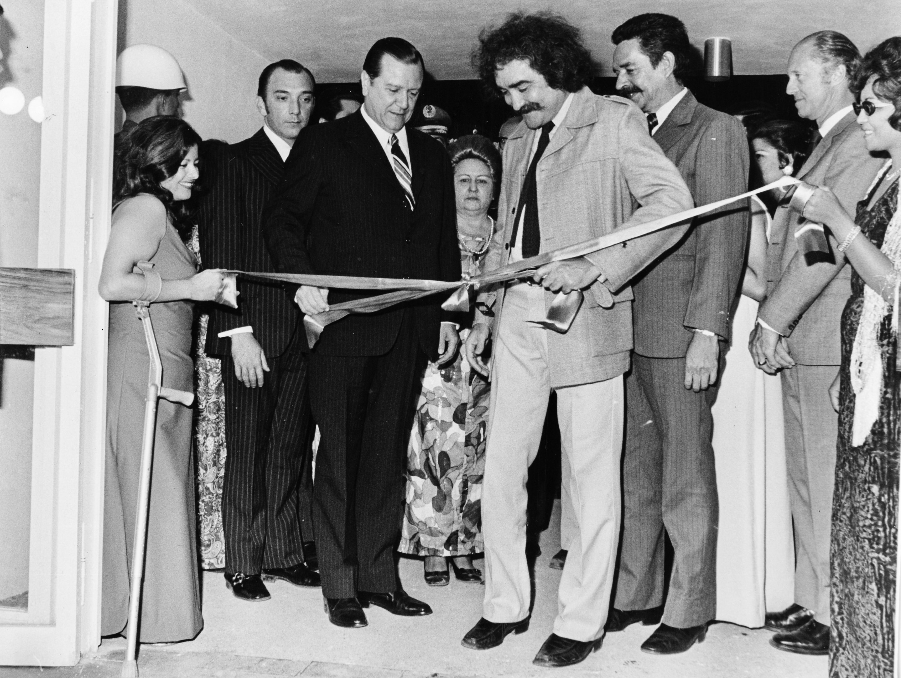 Inauguración del Museo de Arte Moderno Jesús Soto, en Ciudad Bolívar, Venezuela. Aparecen en la foto: Rafael Caldera, Presidente de Venezuela 1969-1974; el artista Jesús Soto y el gobernador del estado Bolívar, Manuel Garrido Mendoza.